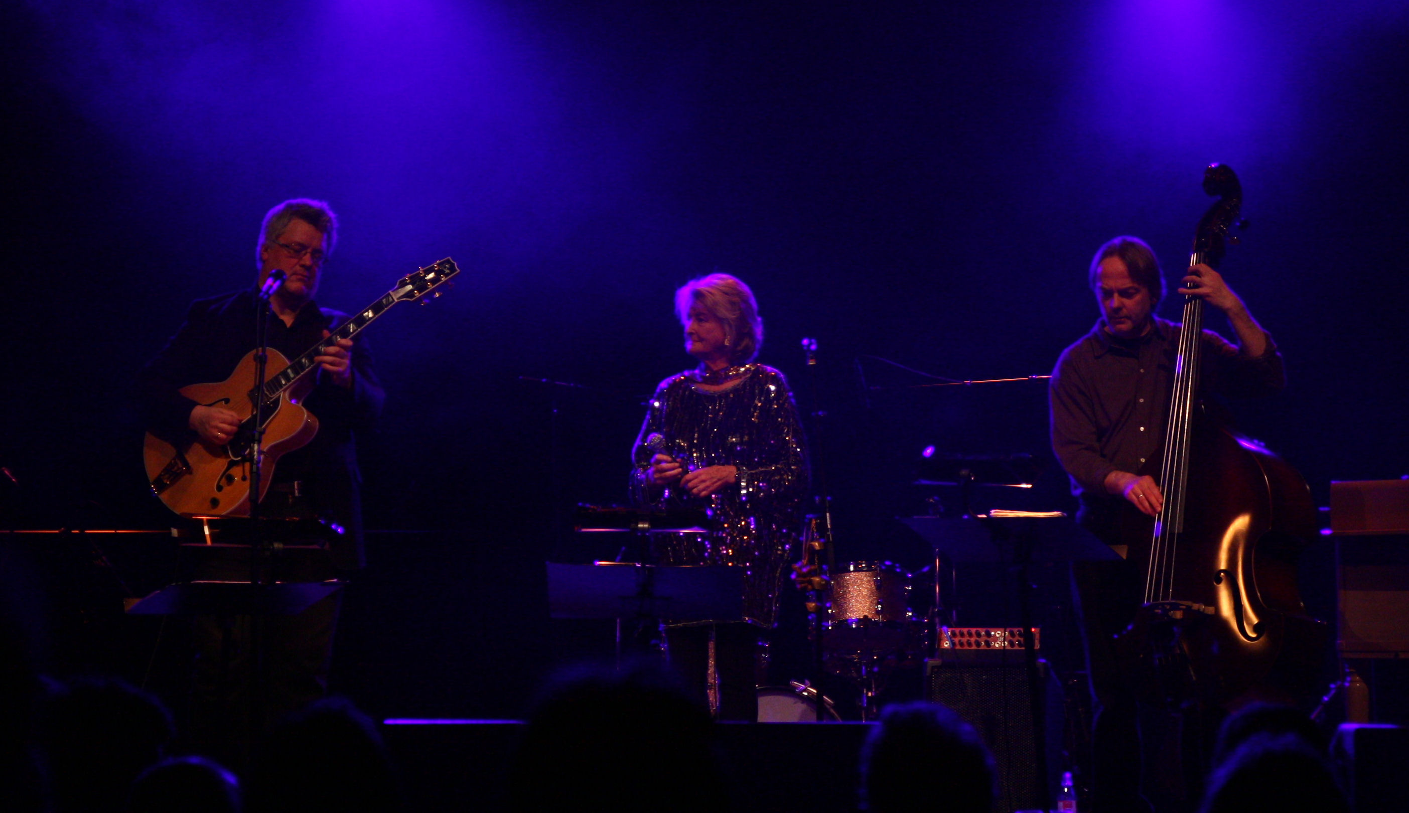 Karin Krog, Ribbejazz 2009